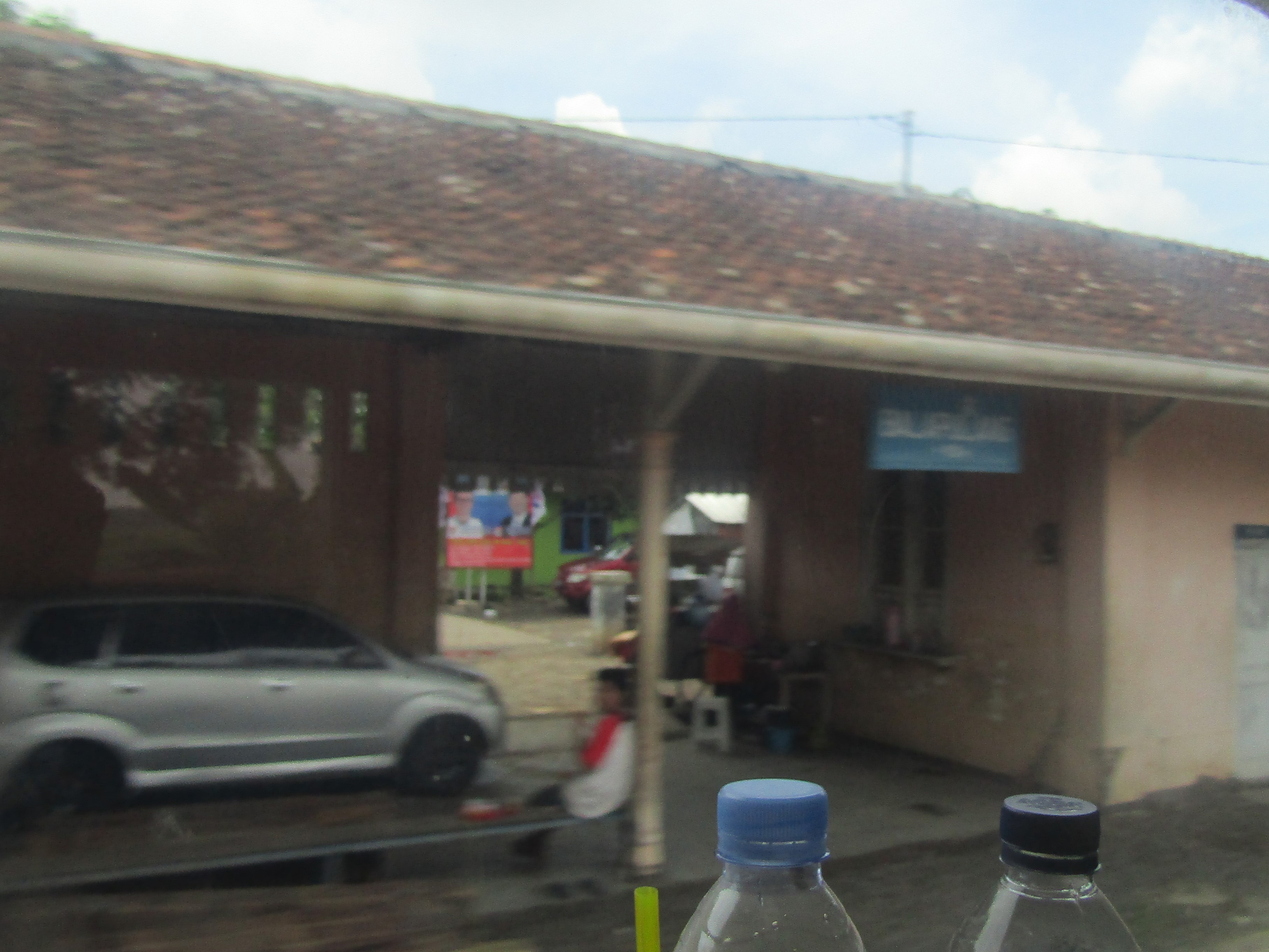 Tampak peron Stasiun Balapulang, 2019